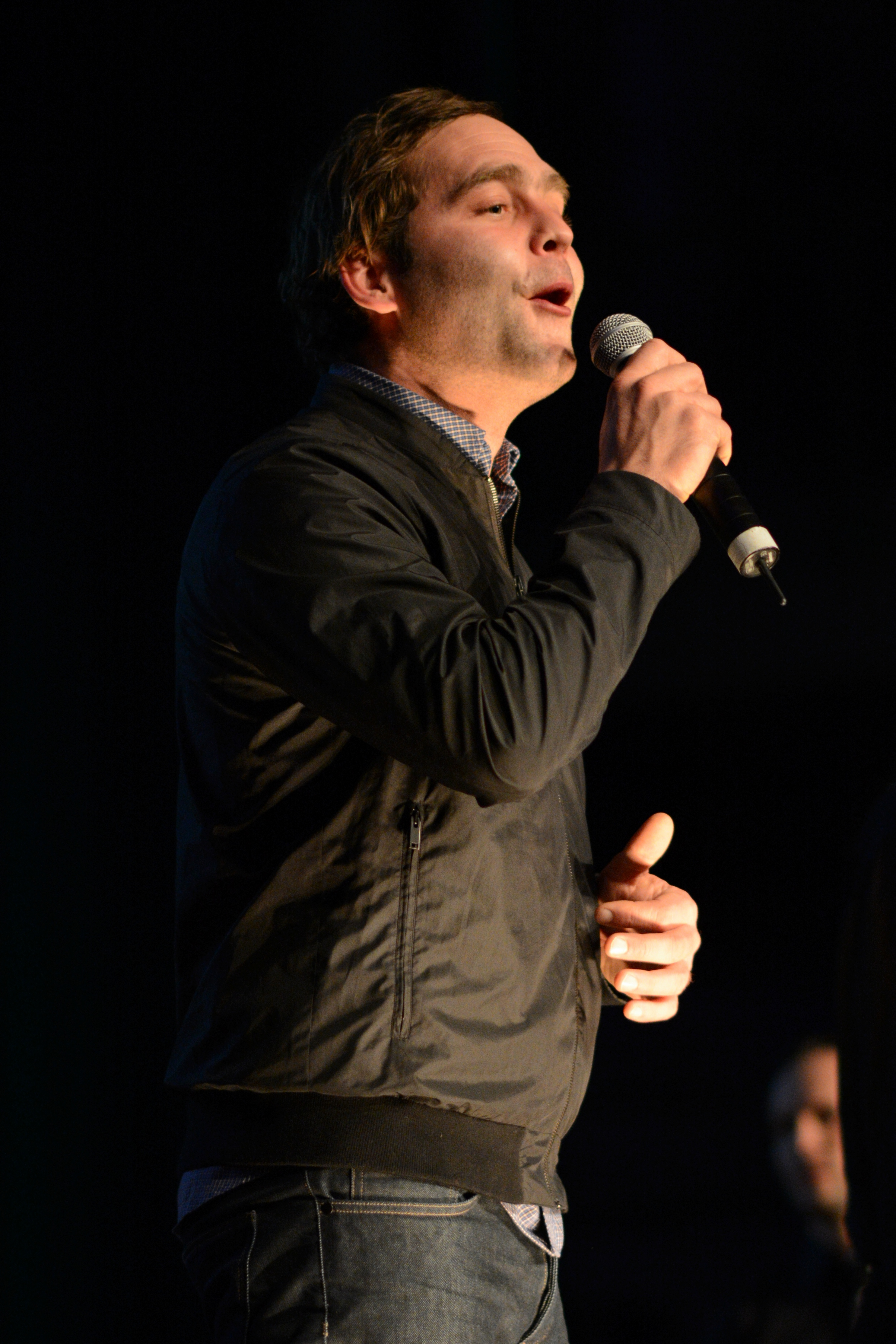 Bosse beim Schüler-Rockfestival 2014.